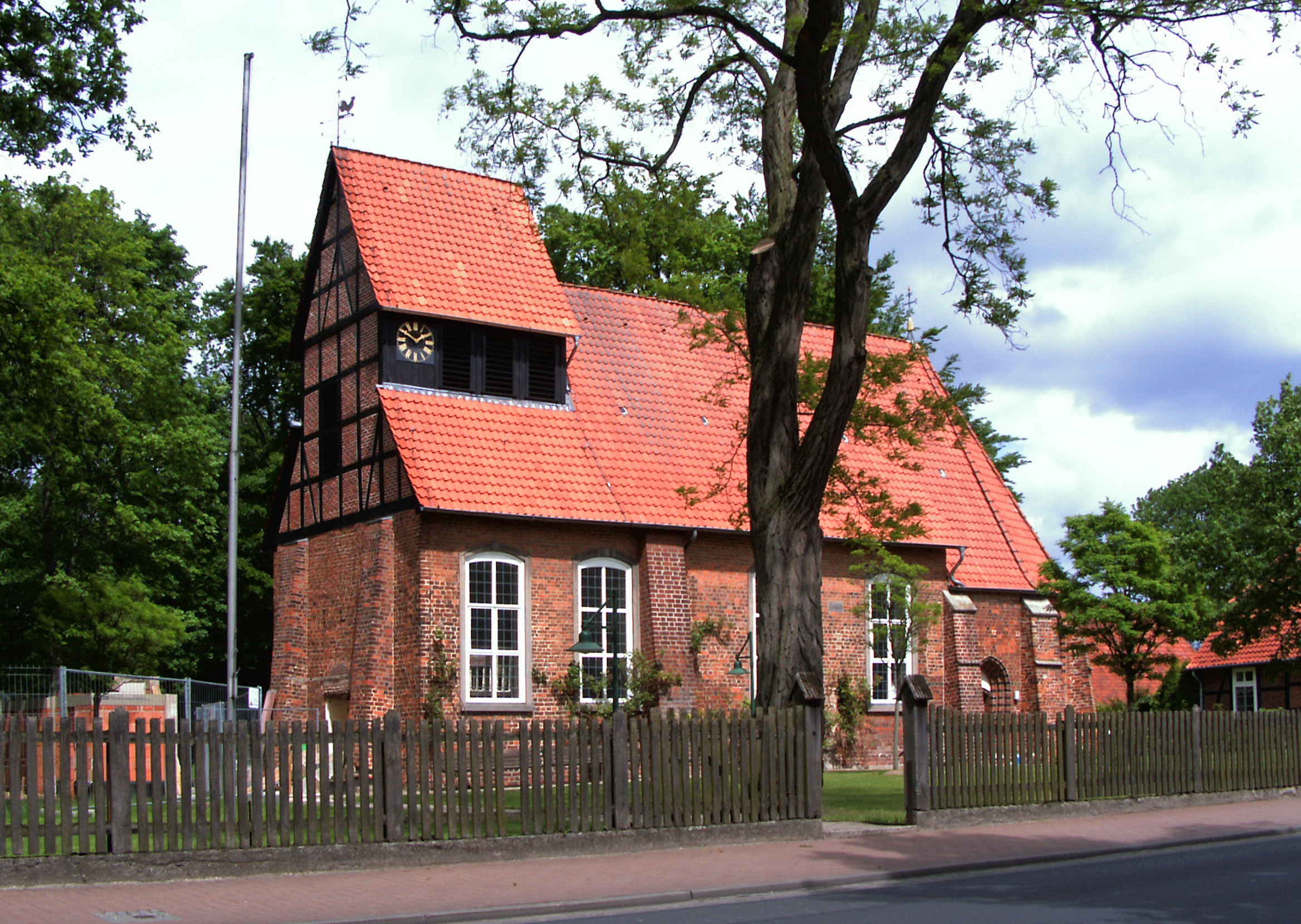 Evangelische Kirche St. Marien in Wathlingen, Landkreis Celle.